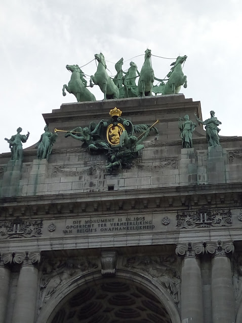 "Dit monument is in 1905 opgericht ter verheerlijking van Belgié's onafhankelijkheid."